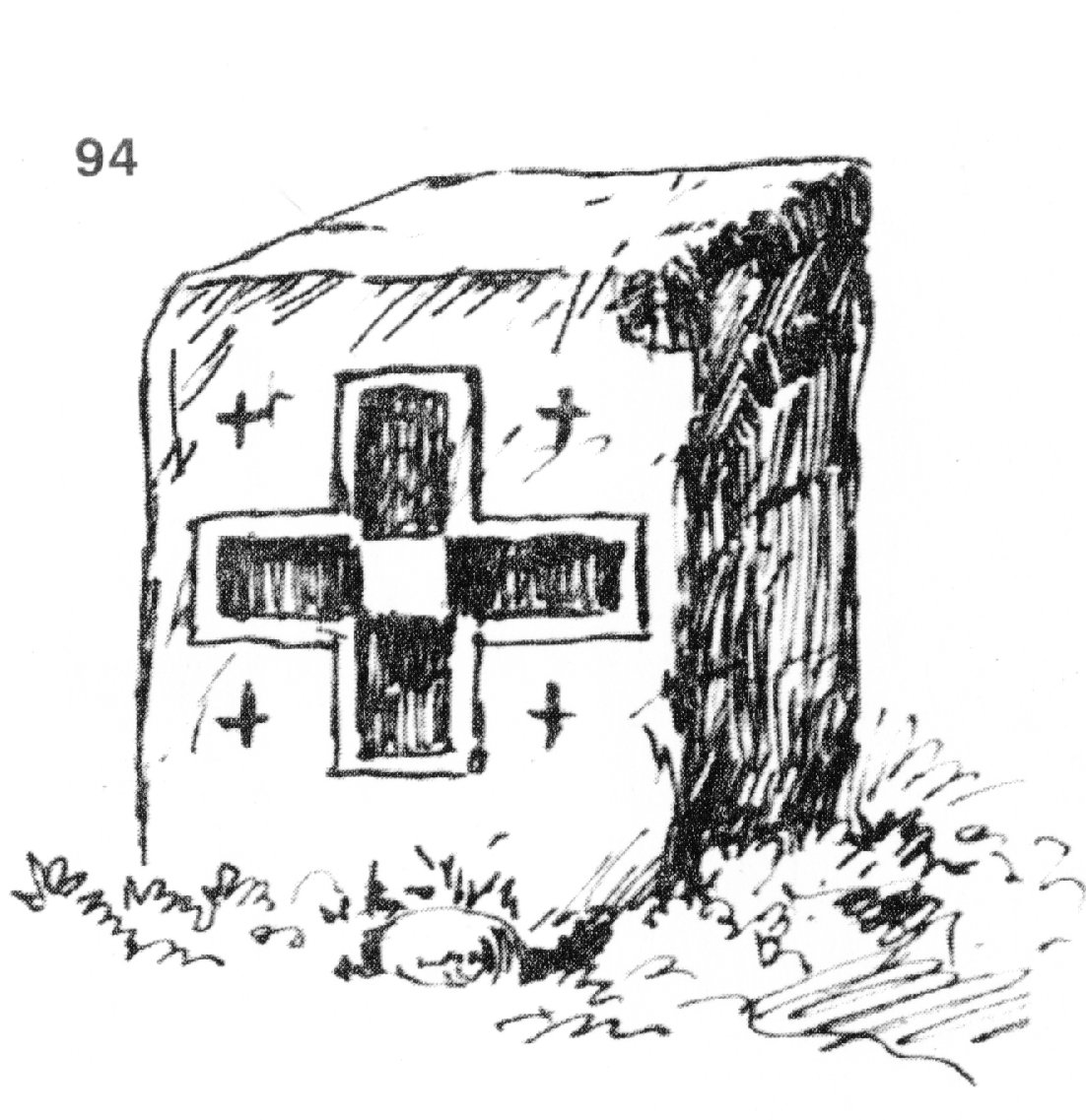 94. Блок от бял точилен камък, 50x42x20 см, с грубо издълбан кръст и между крилата му по едно гравирано кръстче; 20-30-годишен. Из гробищата на с. Търнава, Белослатинско. Скициран на 7 .VIII. 1930 г. (Т. 14, обр. 56.)